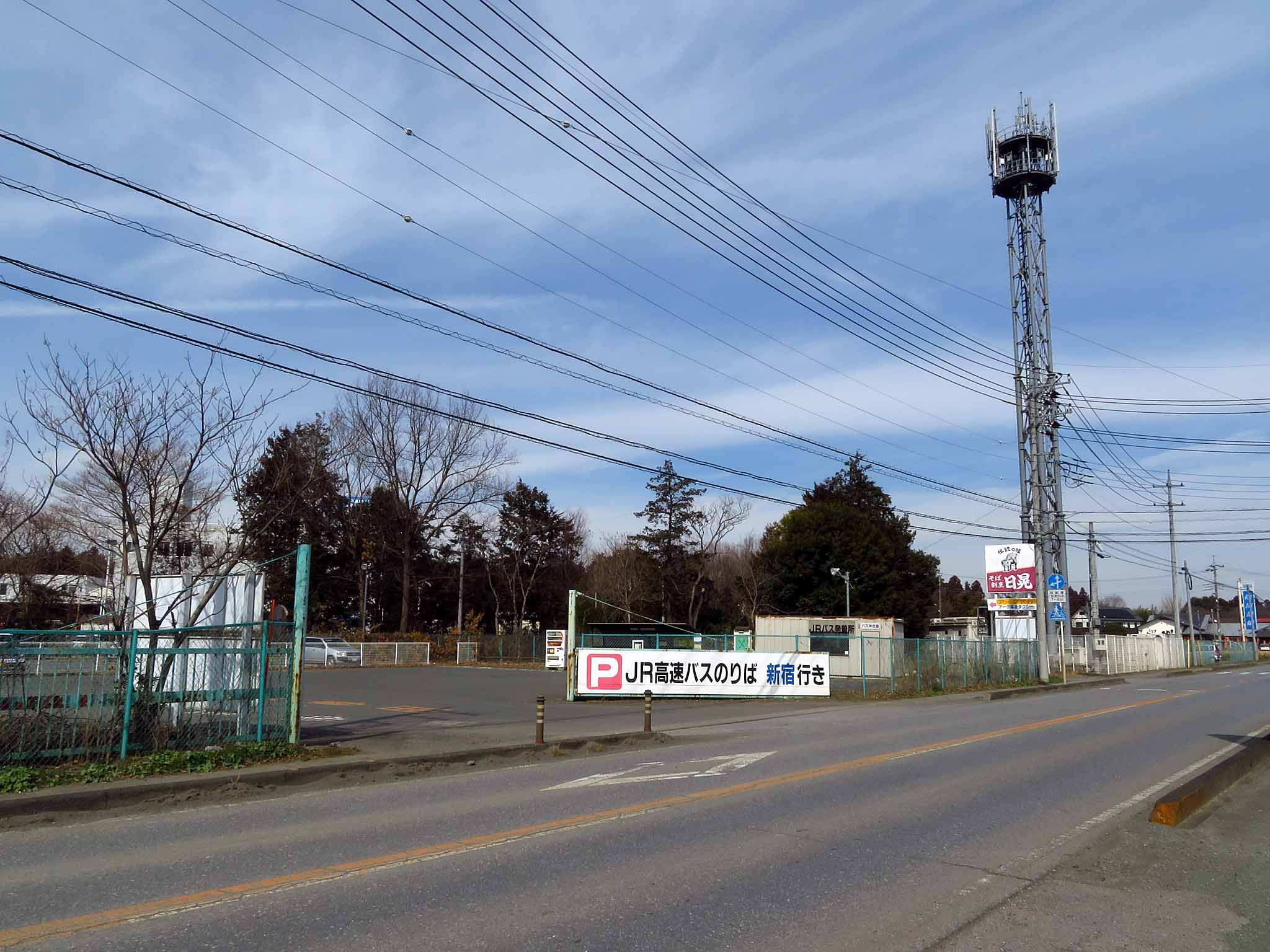 2017年2月に閉鎖・廃止された、JRバス関東鹿沼バスターミナルの晩年の姿。